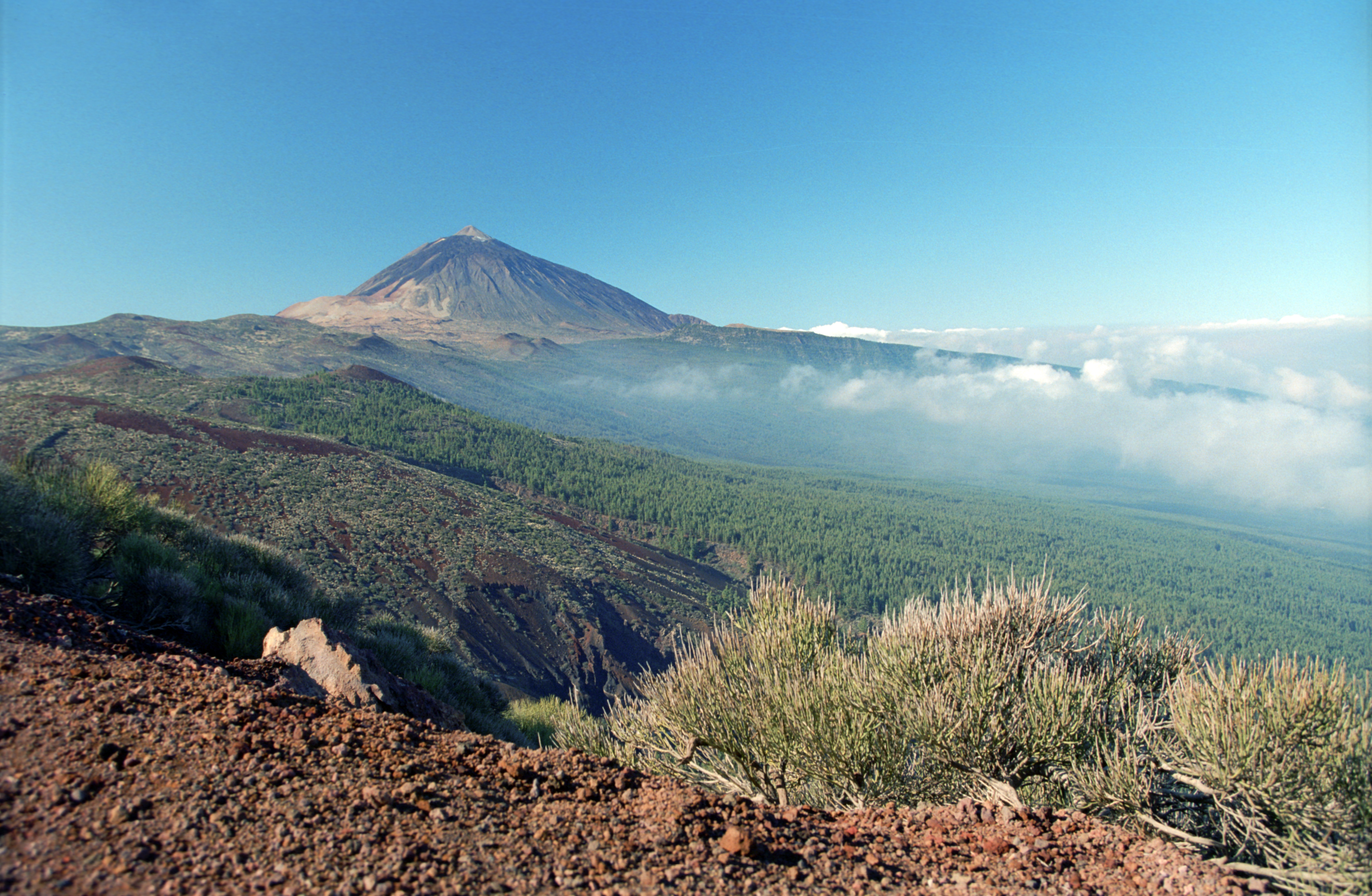 Wulkan Teide